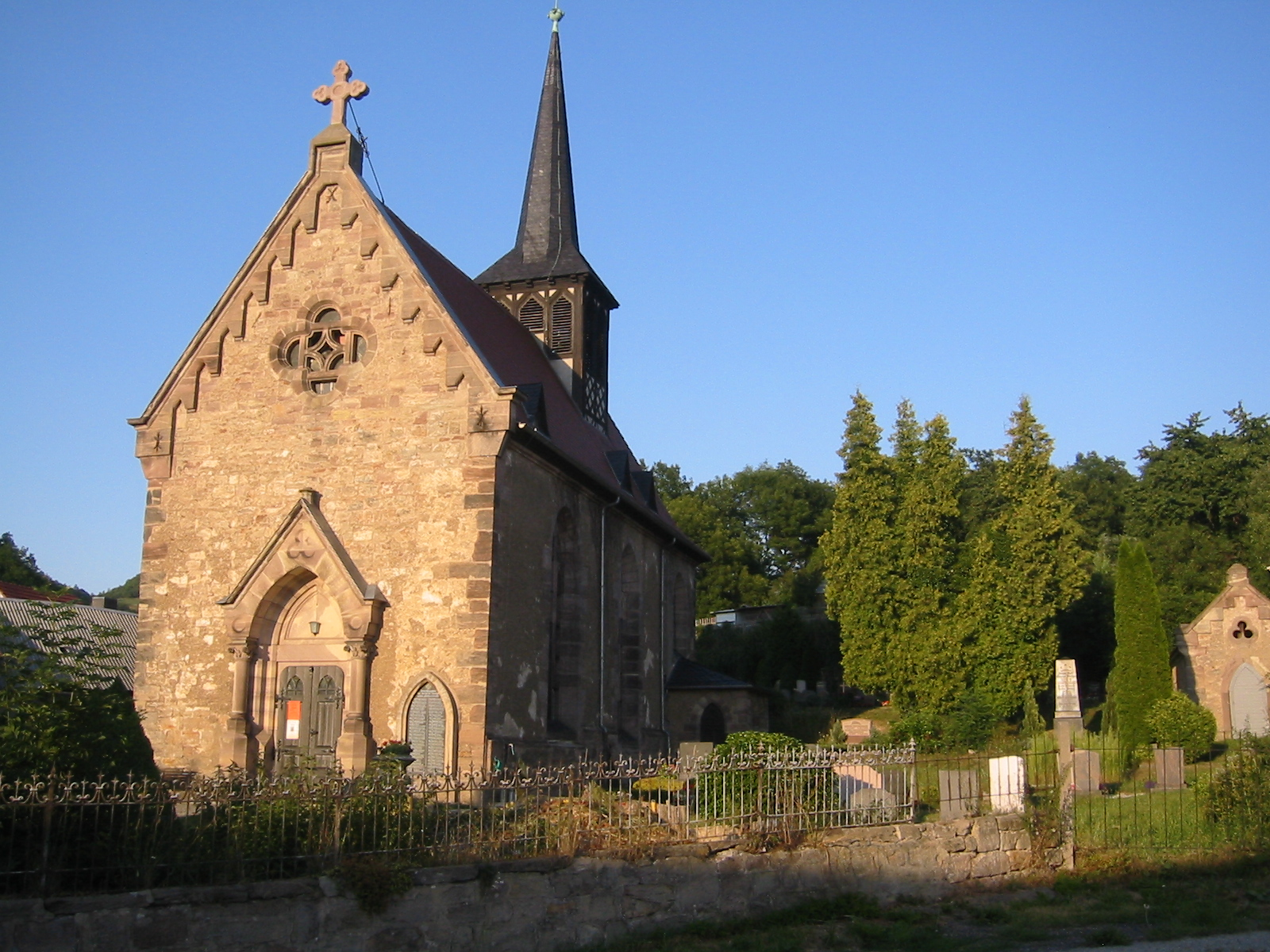 Kirche bei Kahla im Sonnenuntergang